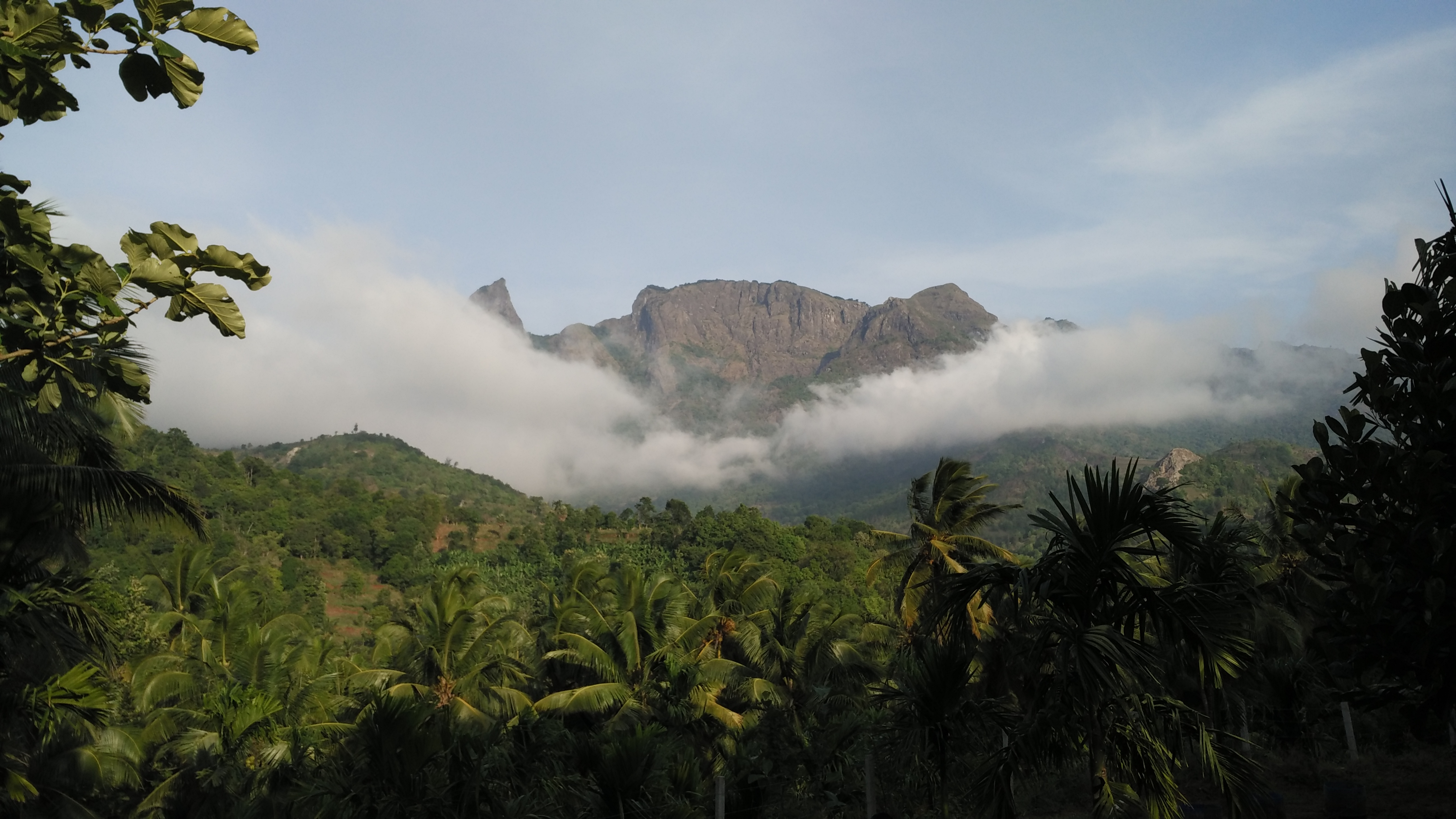 மல்லேஸ்வரன் மலைத்தொடர், தாவளம், அட்டபாடி , கேரளா